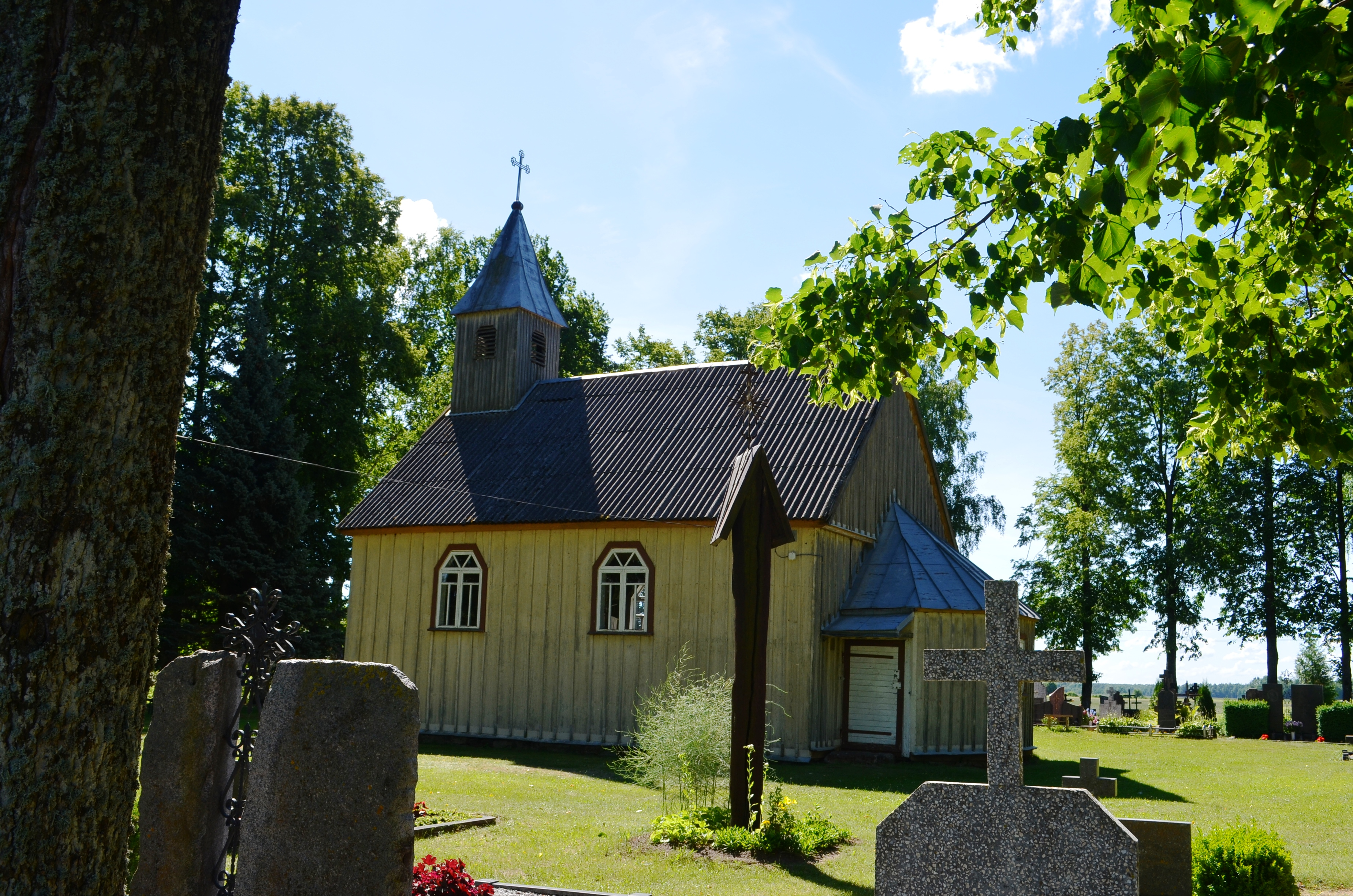 Šaravų bažnyčia, Kėdainių raj.